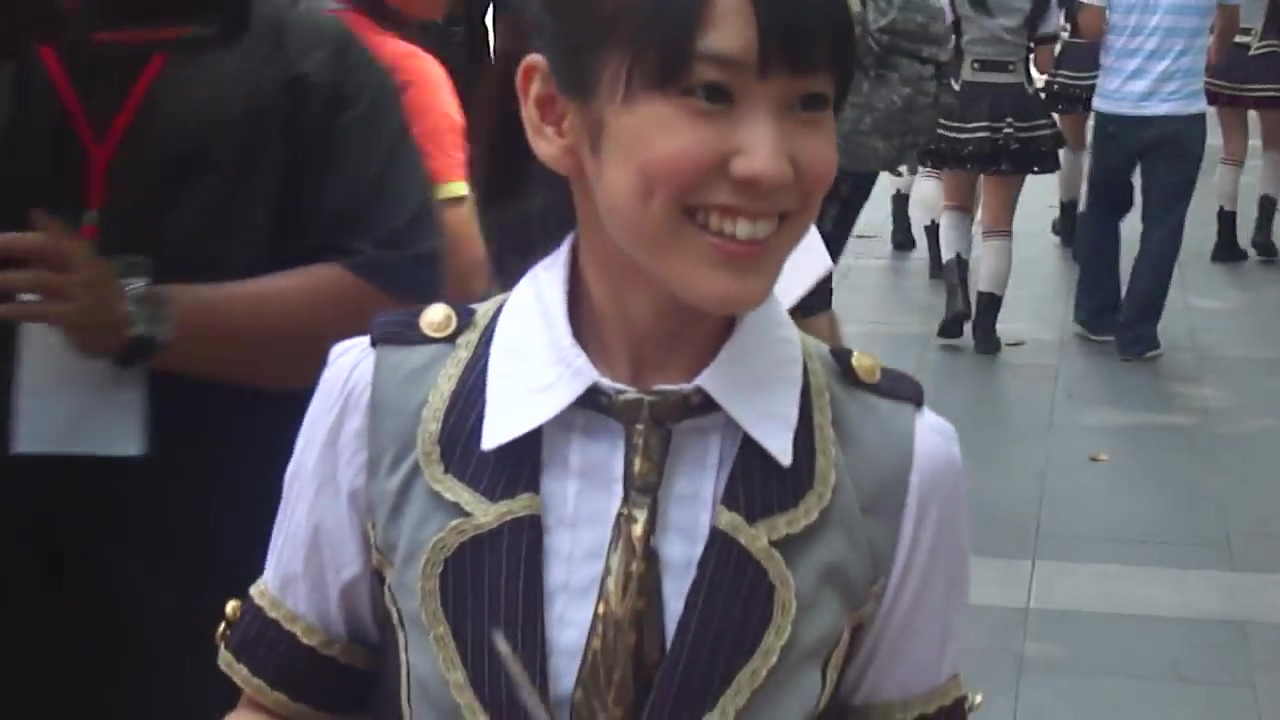 SKE48シンガポール公演（AKB48劇場シンガポール公演第5弾) (佐藤実絵子)